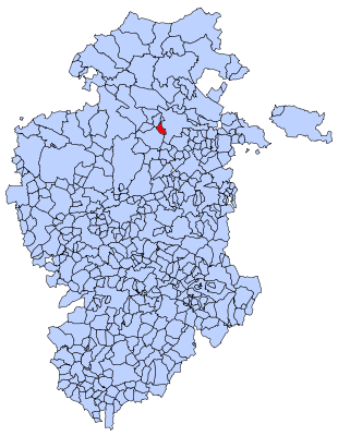 Situación de Salas de Bureba en el mapa de Burgos.